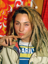 Marilyn in München, Deutschland, 1984